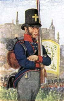 Sächsischer Soldat: 1813-1815 Sächsische Generalität und Infanterie; Landwehrmann